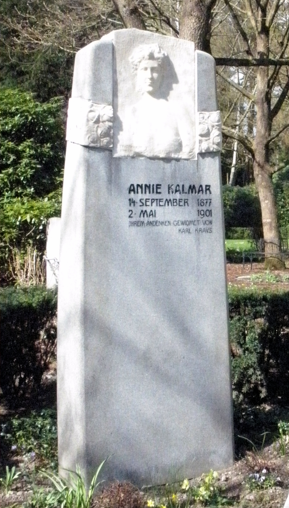 Historischer Grabstein der deutschen Schauspielerin AnnieKalmar im Garten der Frauen, Friedhof Ohlsdorf.Ursprünglicher Standort: Planquadrat J 9 (oberhalb Rosengarten) bei Hans-Günther Freitag: Von Mönckeberg bis Hagenbeck: ein Wegweiser zu denkwürdigen Grabstätten auf dem Ohlsdorfer Friedhof, Hansa-Verlag, Hamburg 1973, Seite 172.